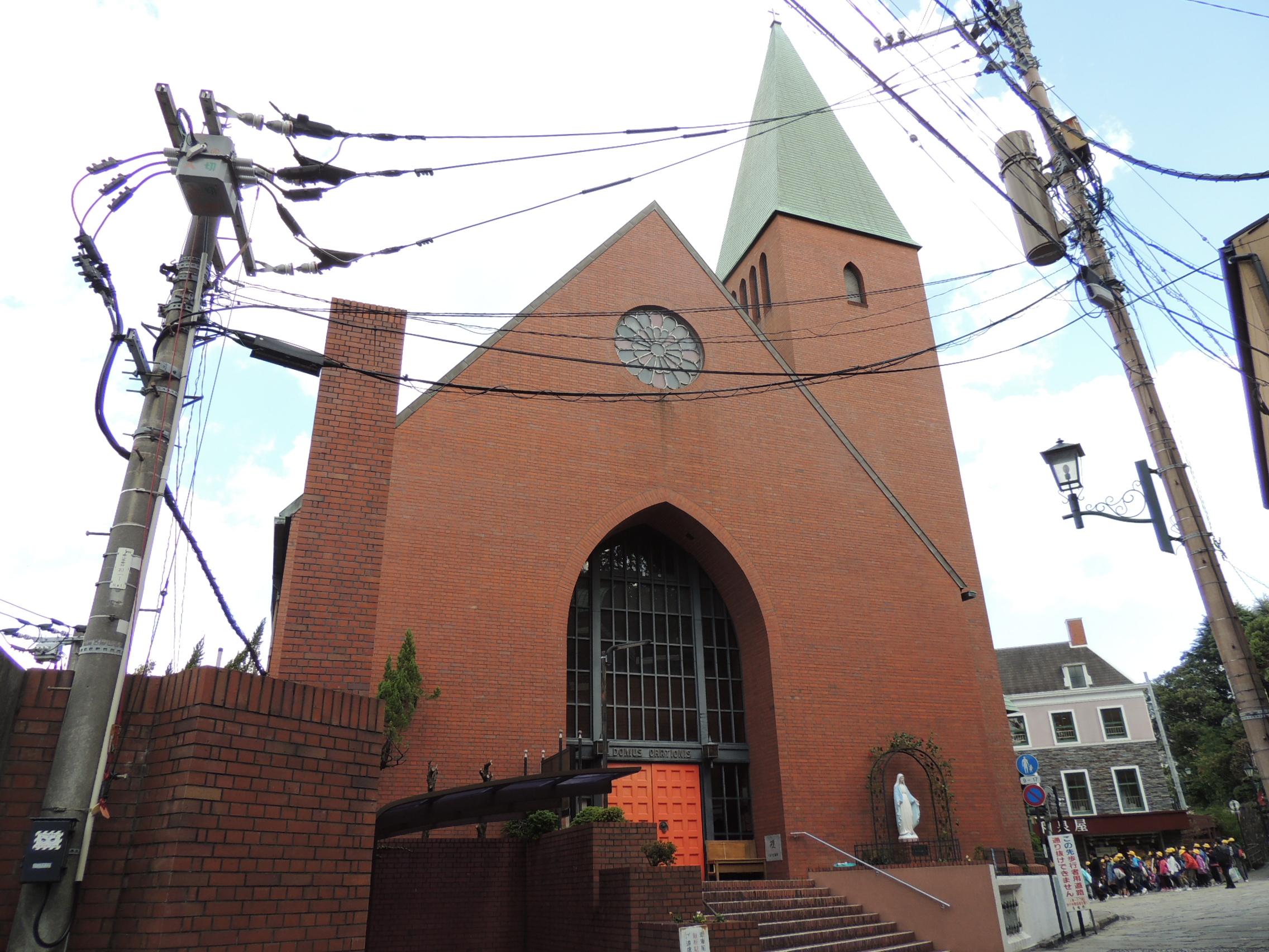 Template:大浦天主堂下にある大浦教会。